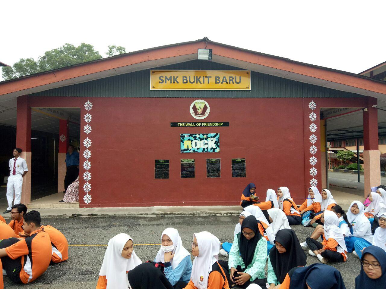 Wall of Freindship SMKBB